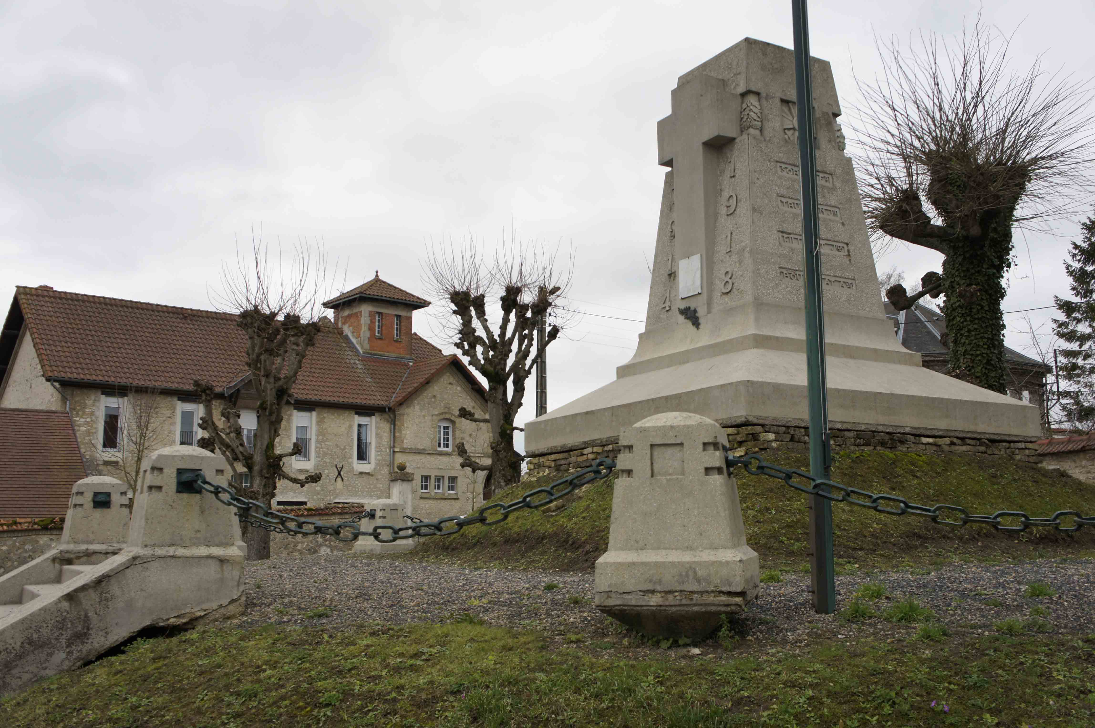 vue du Monument aux morts Pargny-les-Reims.